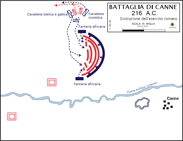 Traduzione italiana di File:Battle cannae destruction.gif in PNG